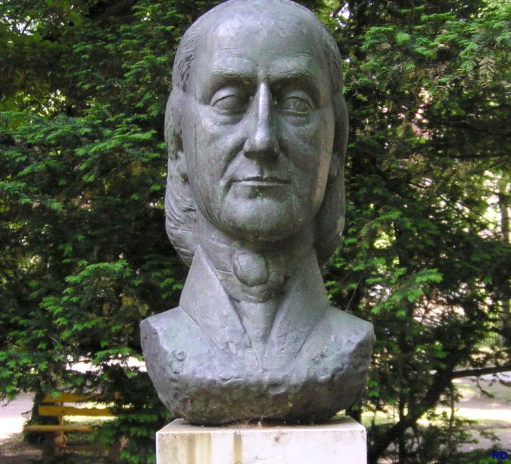 GutMuths-Denkmal in Schnepfenthal